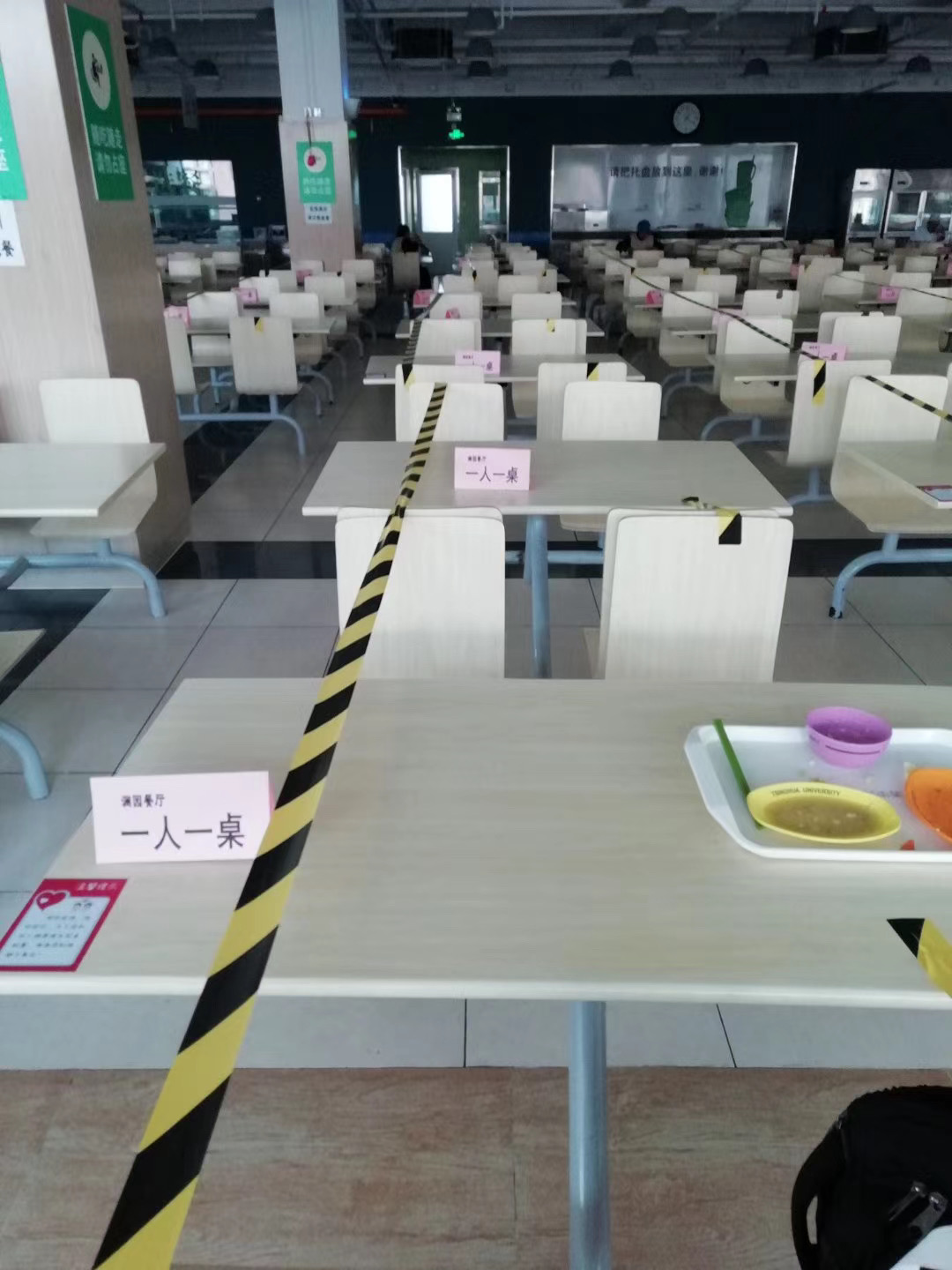 北京清華大學新冠肺炎疫情期間，在食堂採一人一桌的防疫措施